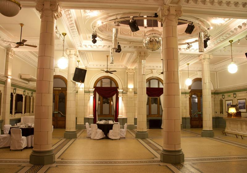 Salón central con piso de cerámicos de una pulgada por una pulgada